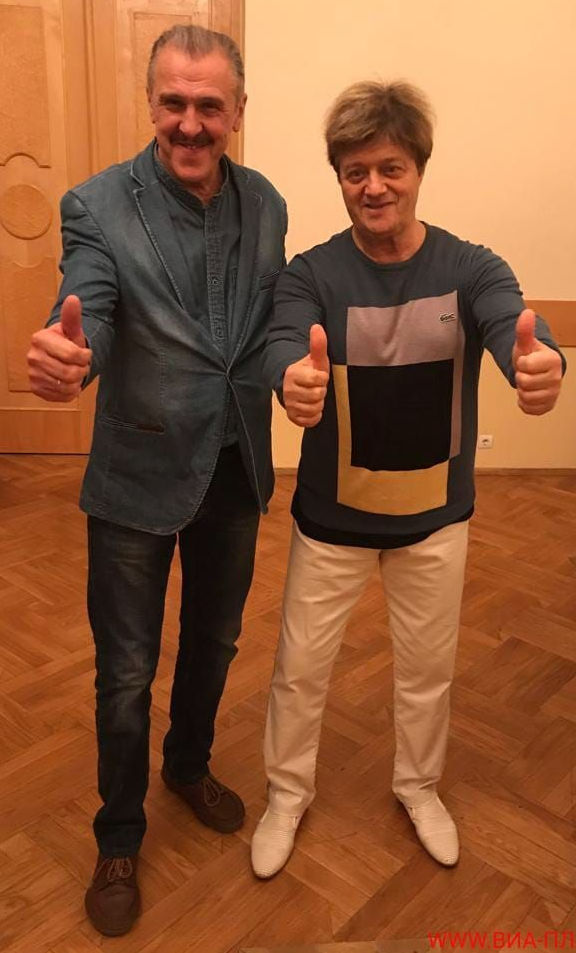 АЛЕКСАНДР ЕВДОКИМОВ (ВИА «ПЛАМЯ») и ВАЛЕРИЙ ДАЙНЕКО (ансамбль «БЕЛОРУССКИЕ ПЕСНЯРЫ»). ВИА «Пламя» под руководством Юлии Ариничевой.